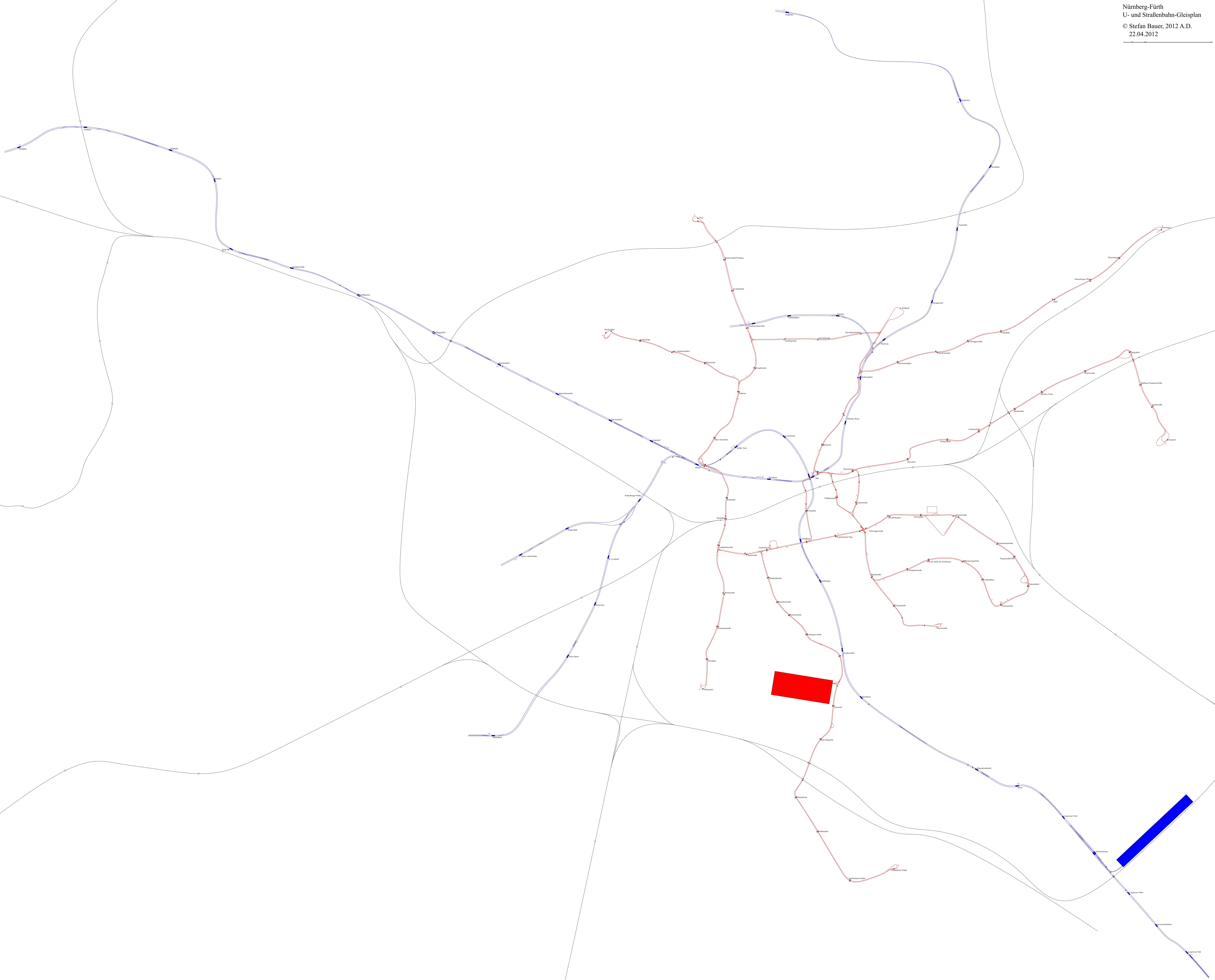 U- und Straßenbahn-Gleisplan Nürnberg 2012